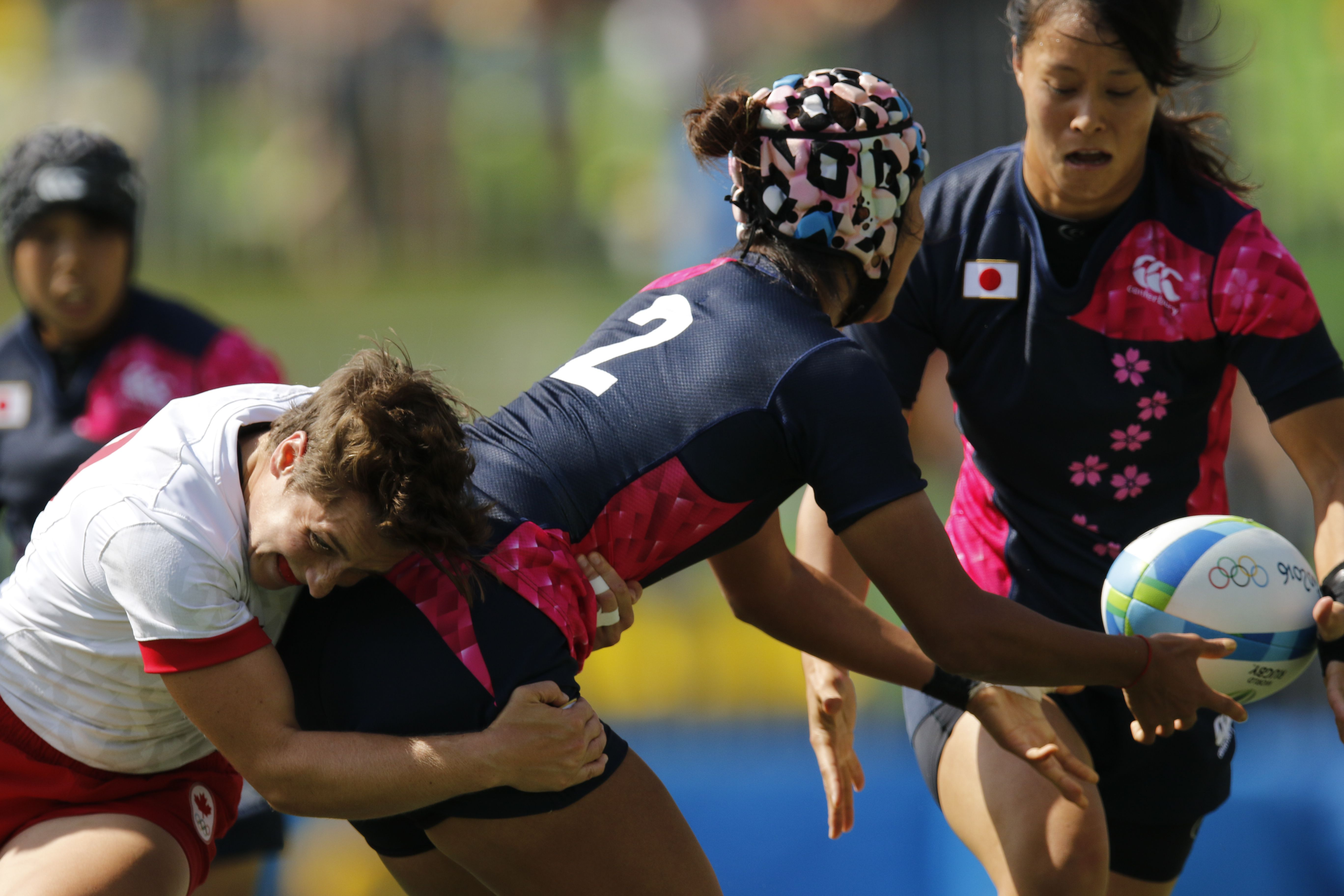 Rugby feminino: Canadá vence Japão por 45 a 0